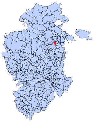 Grisaleña en Burgos